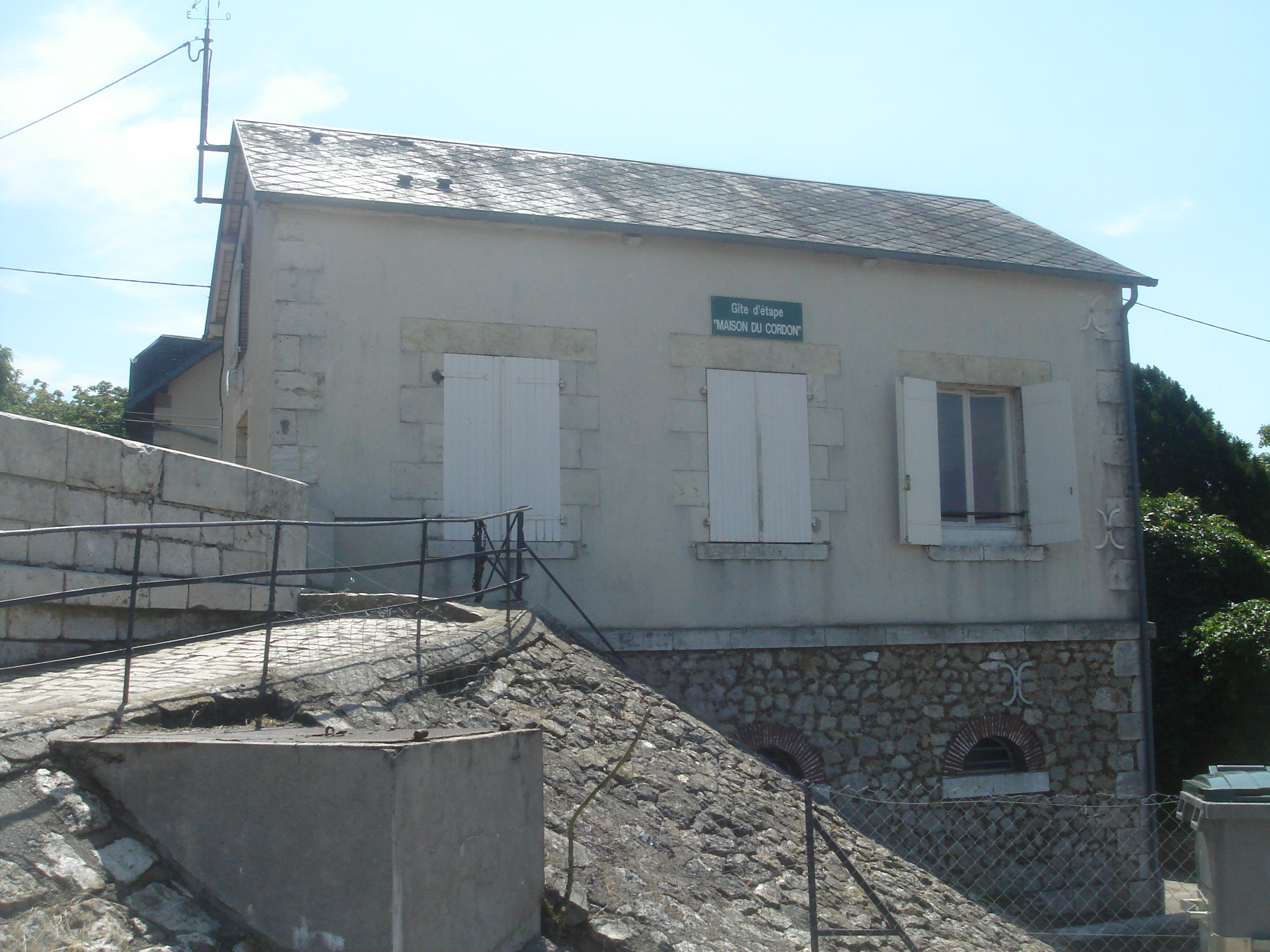 Gîte d'étape, Maison du Cordon, Jargeau, Loiret, France